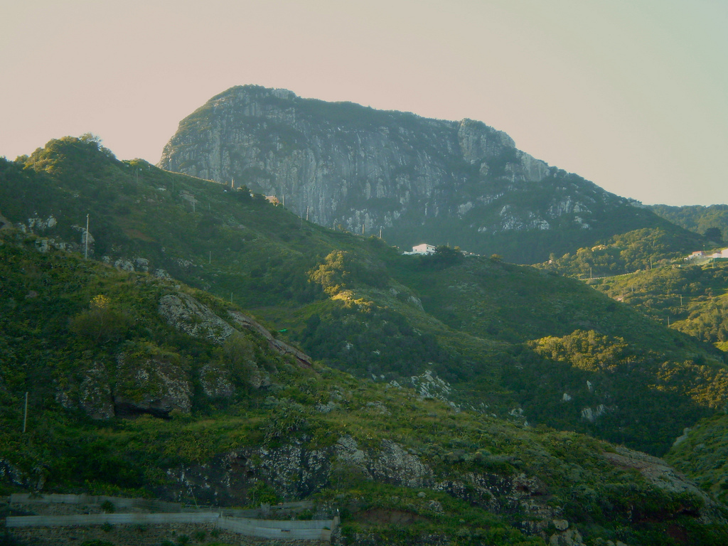 Roque Negro Visto desde Afur